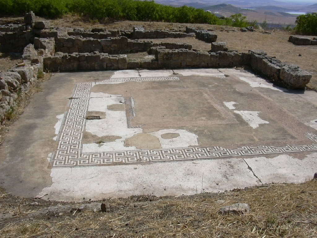 Morgantina_Sicilia, quartiere ovest, Casa Pappalardo, mosaico